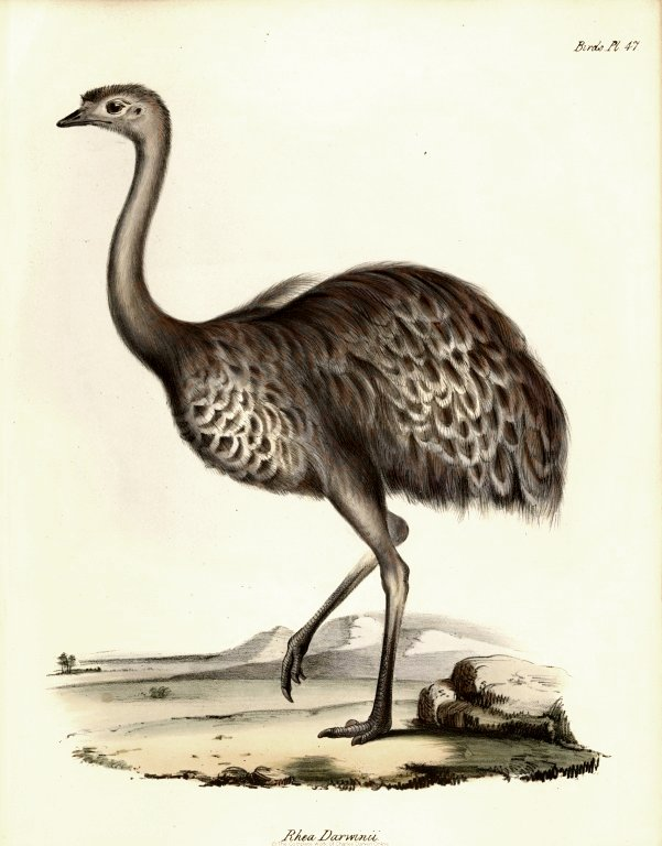 Pterocnemia pennata (Original description: Rhea darwinii)